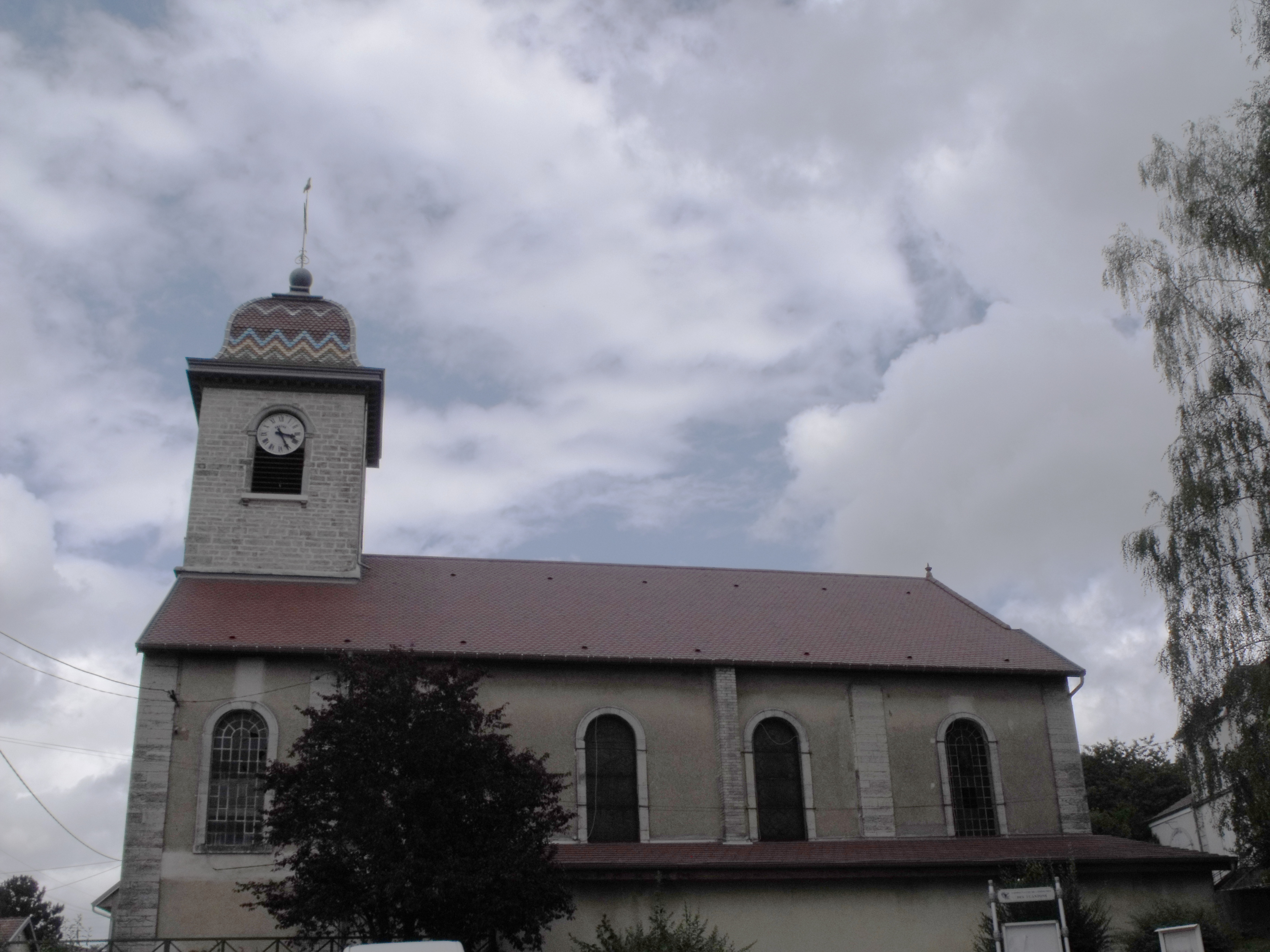 Eglise d'Etouvans, Doubs, France